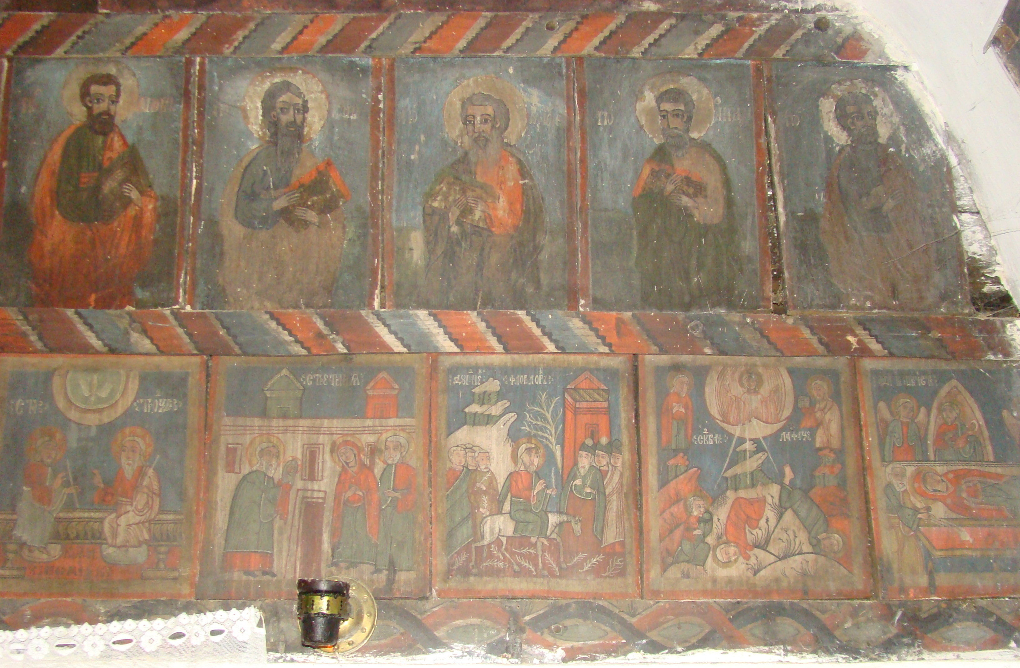 Biserica de lemn „Sf. Nicolae” din Ștefănești